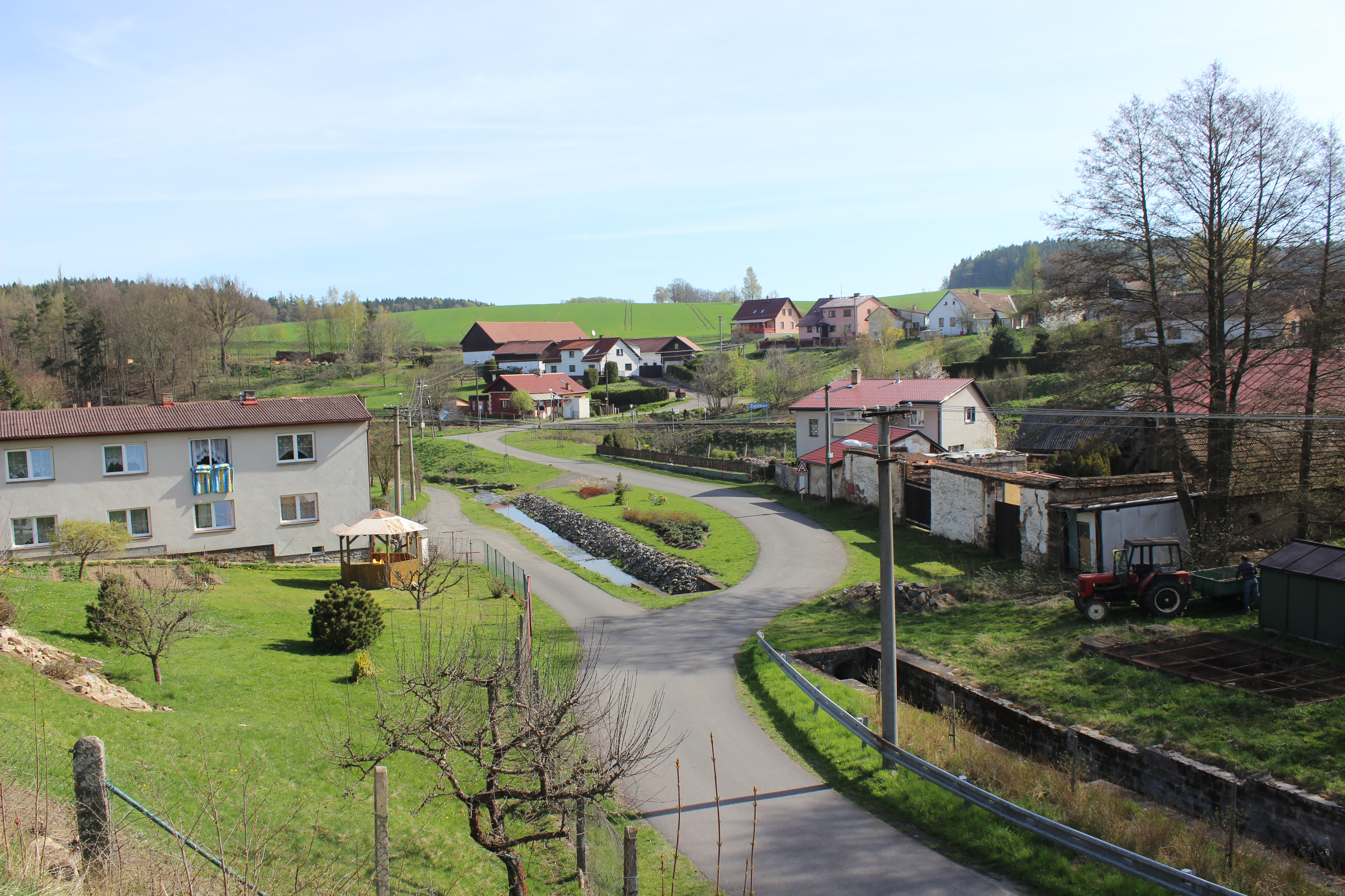 Střední partie Zajíčkova. Project: Fotíme Česko.